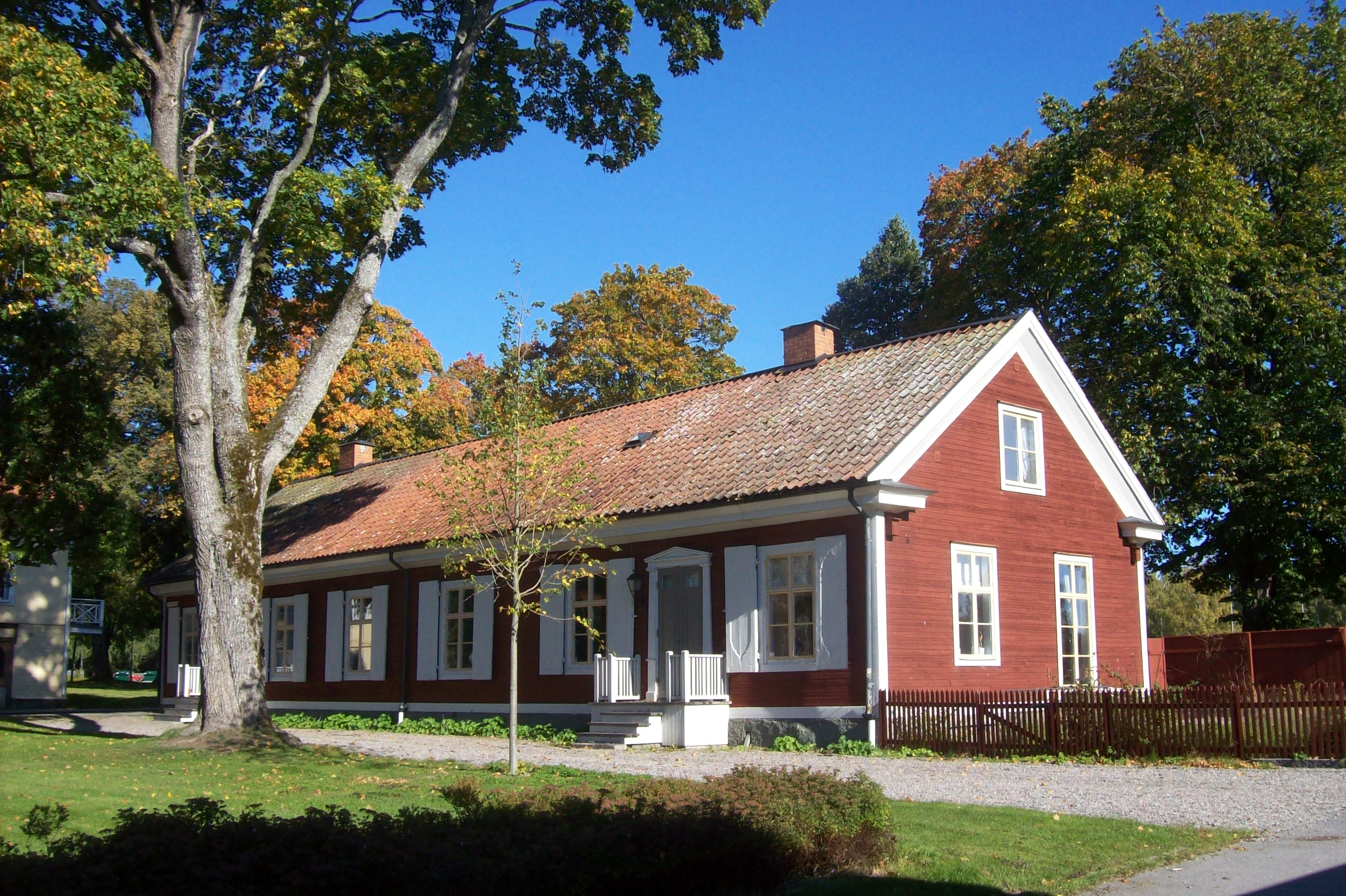 Flens kommun, Lagmannen 1, Malmköpings Tingshus